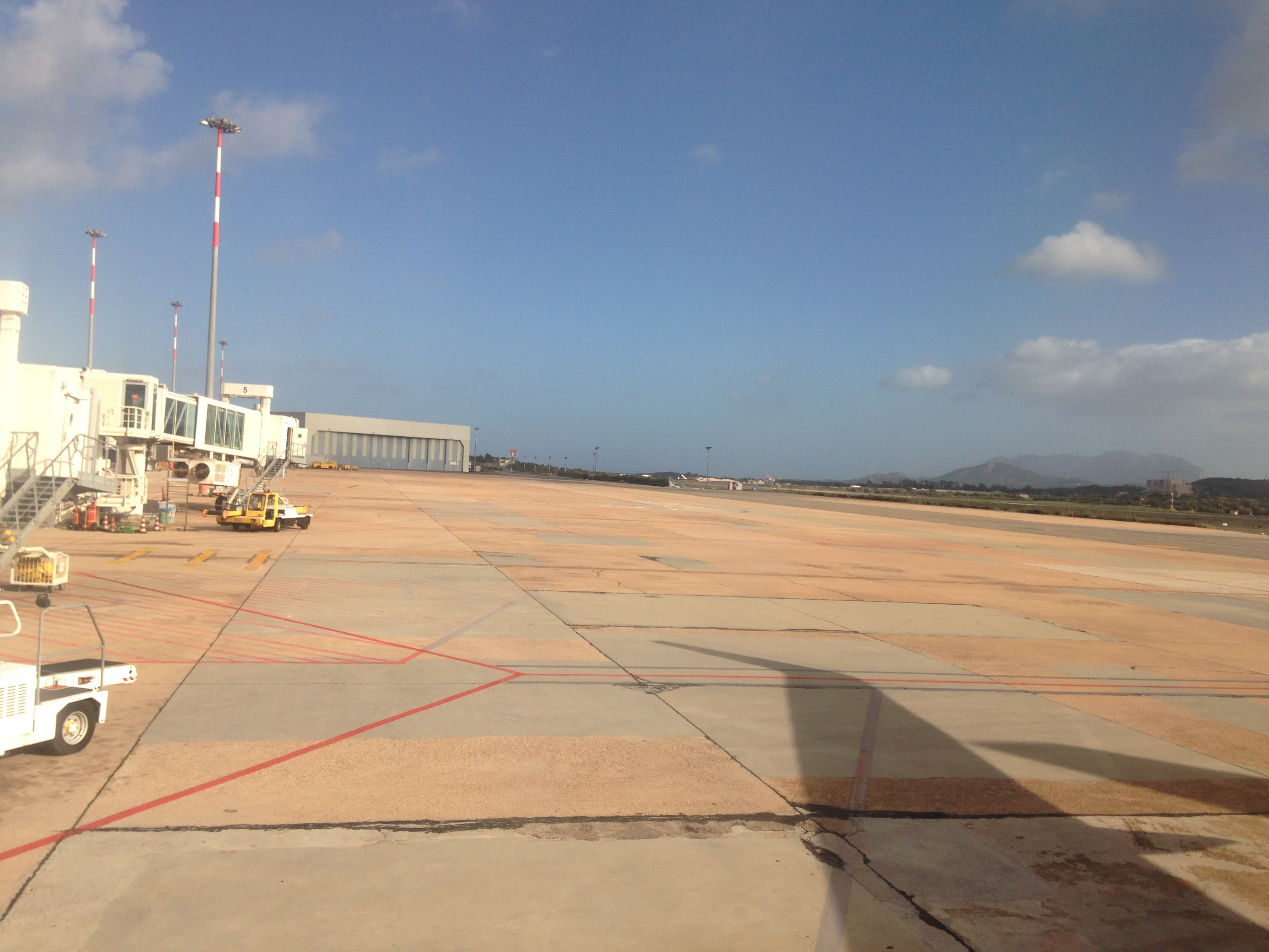 Veduta sul piazzale di sosta degli aeromobili. Sulla sinistra i ponti mobili per l'imbarco e lo sbarco dei passeggeri dagli aerei.